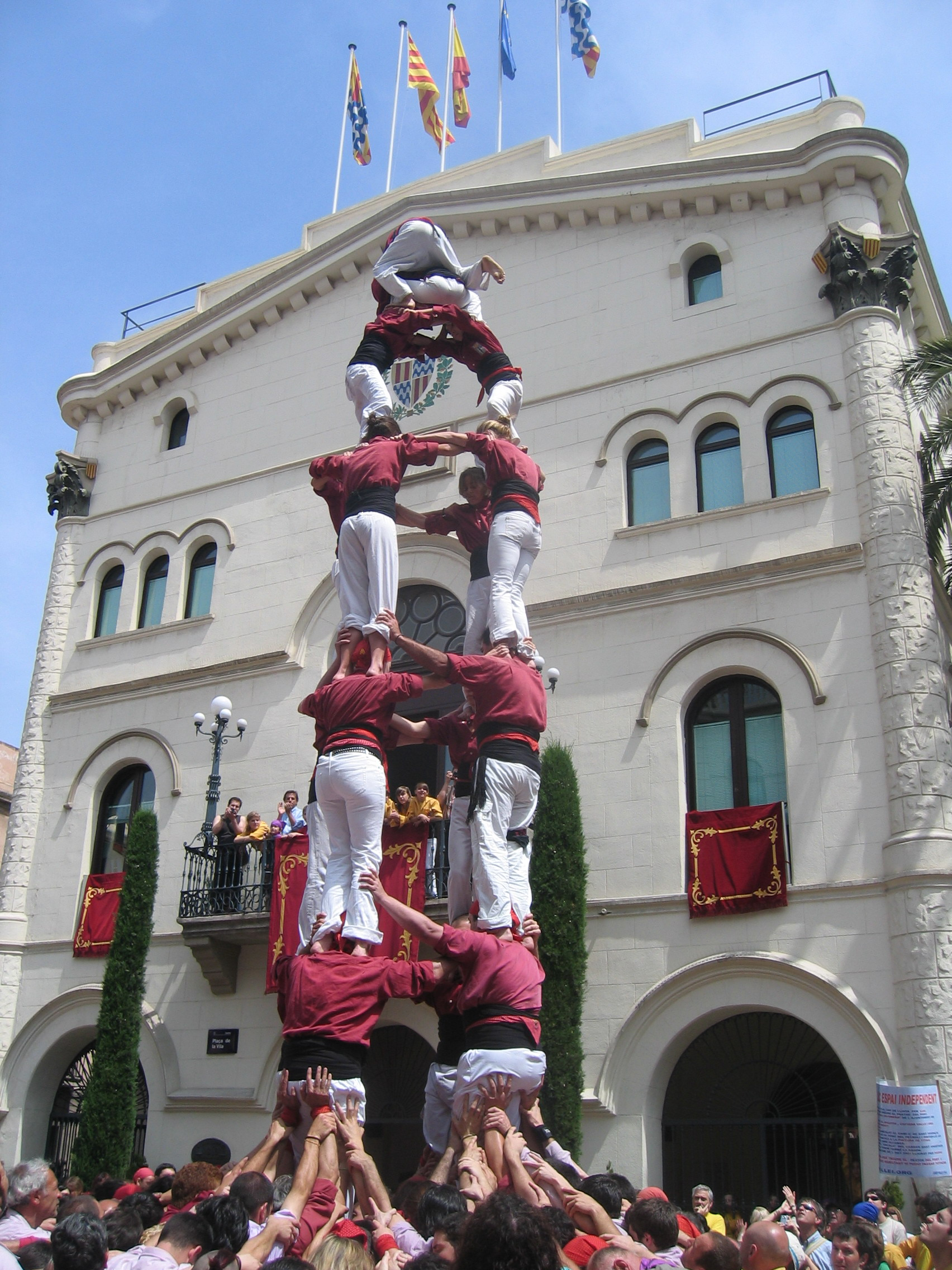 Els castellers de Mallorca a la jornada castellera de les Festes de Maig 2007 a Badalona